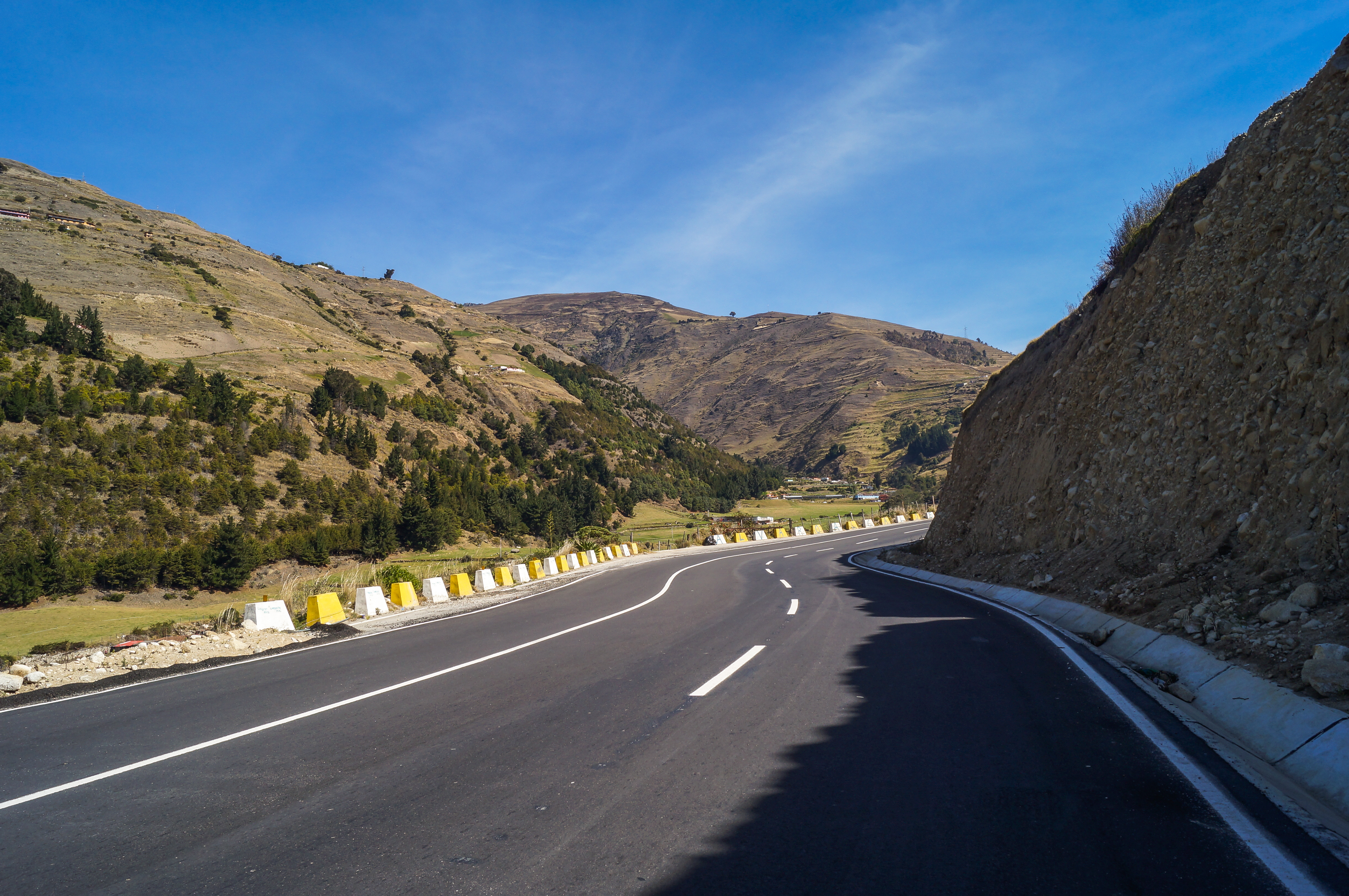 Paisaje Merideño